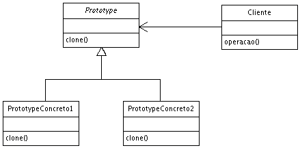 Prototype design pattern UML diagram.